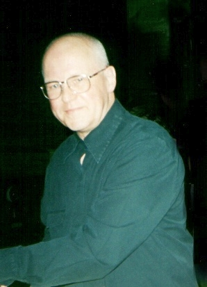 Wijnand van de Pol (2004 ca.)